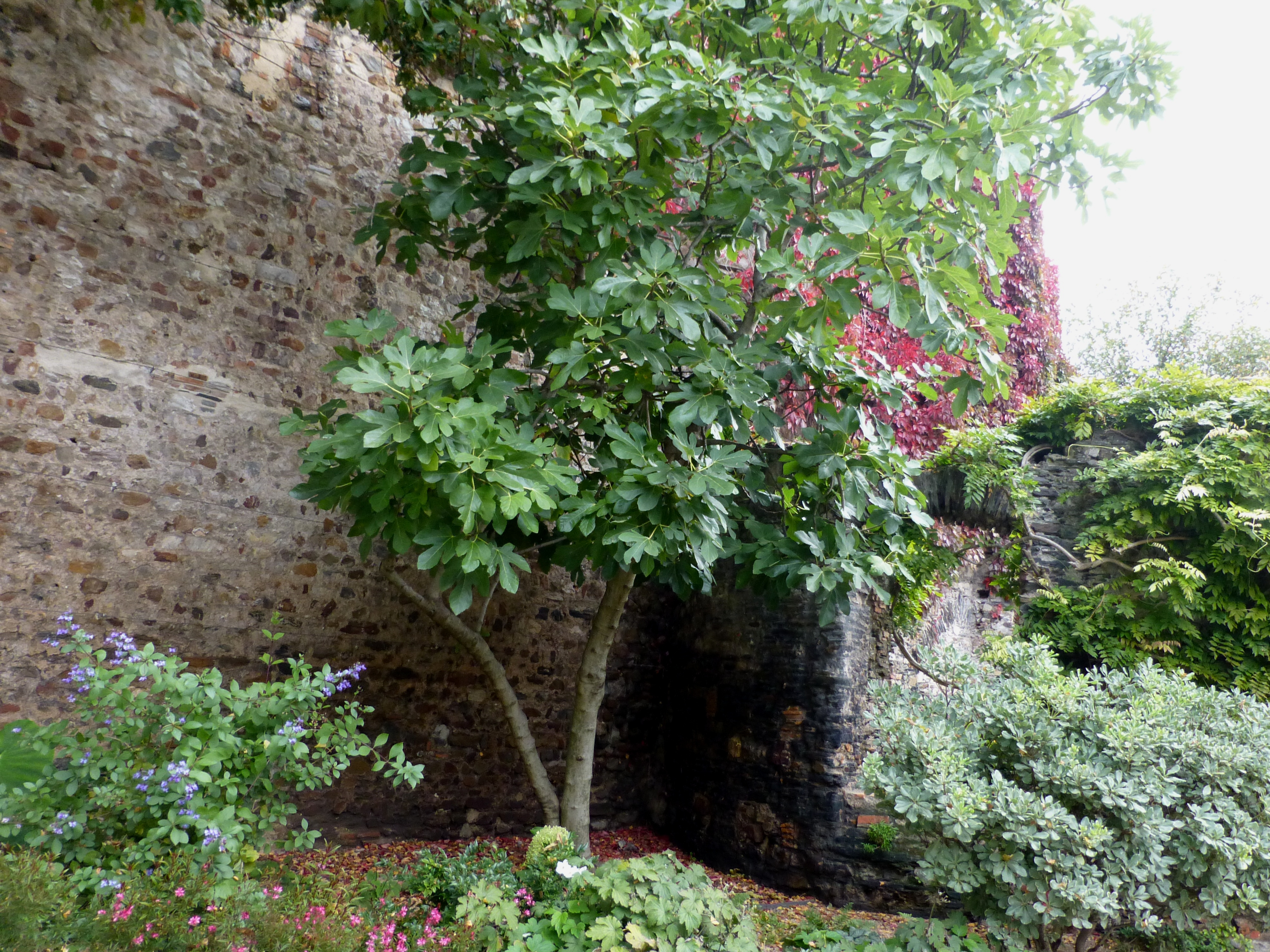 Angers, Rempart du Bas-Empire rue Toussaint.